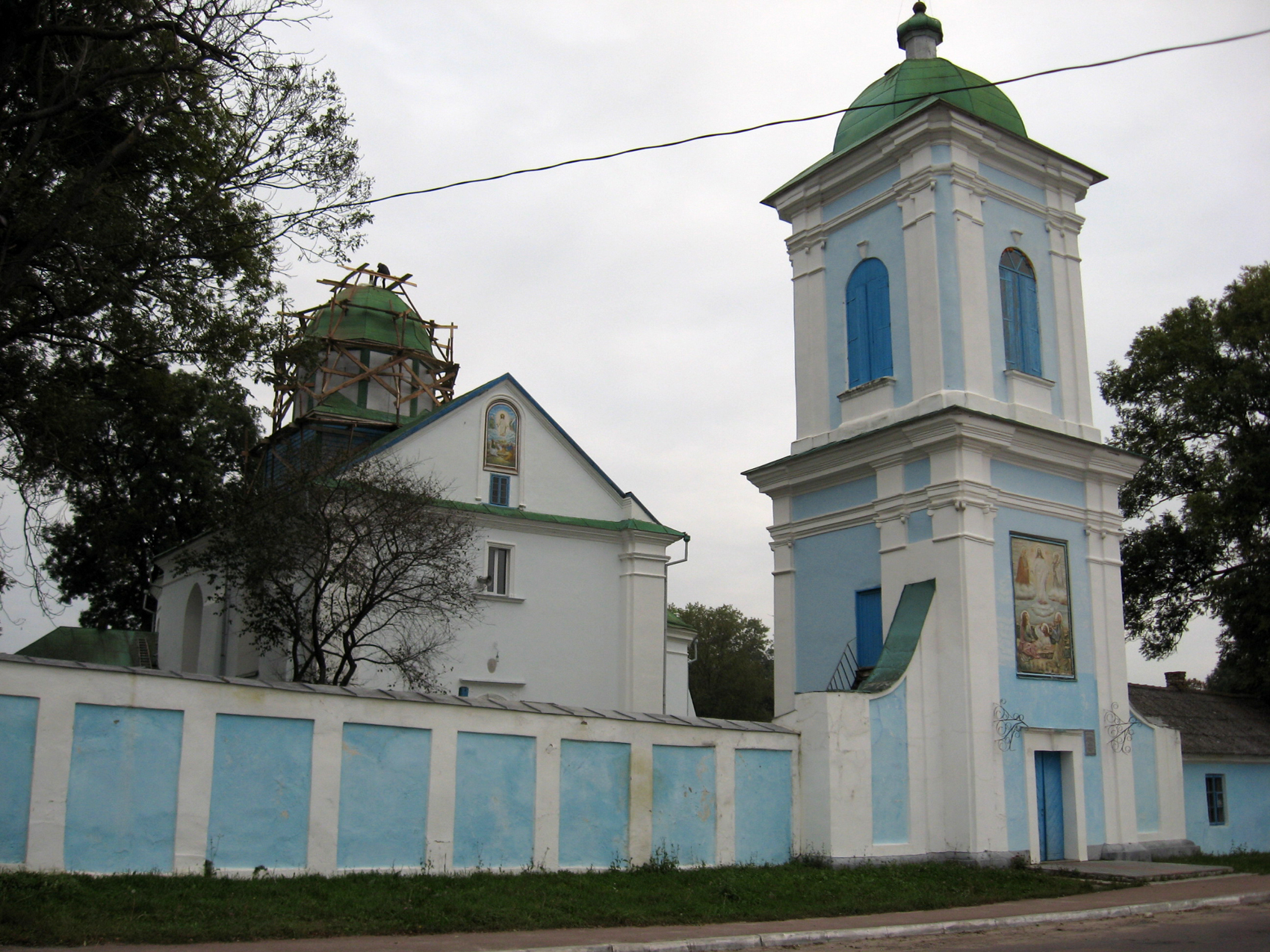 Спасо-Преображенська церква. Місто Шумськ.